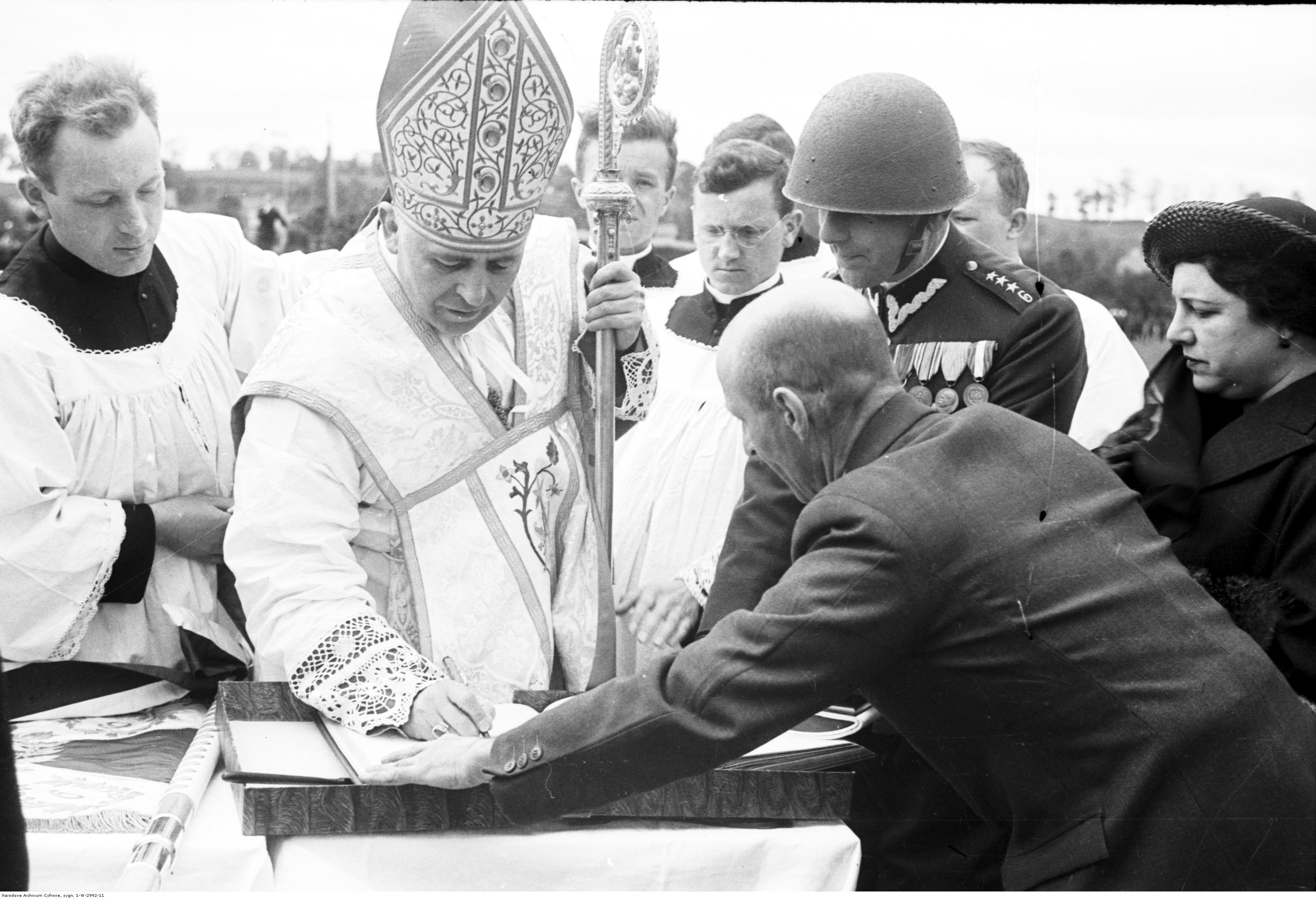 Wręczenie i poświęcenie sztandarów pułkom artylerii na krakowskich Błoniach; 29 maj 1938. Biskup polowy WP Józef Gawlina wpisuje się do księgi pamiątkowej 6 Pułku Artylerii Lekkiej. Koncern Ilustrowany Kurier Codzienny - Archiwum Ilustracji. Sygnatura: 1-W-2992-11